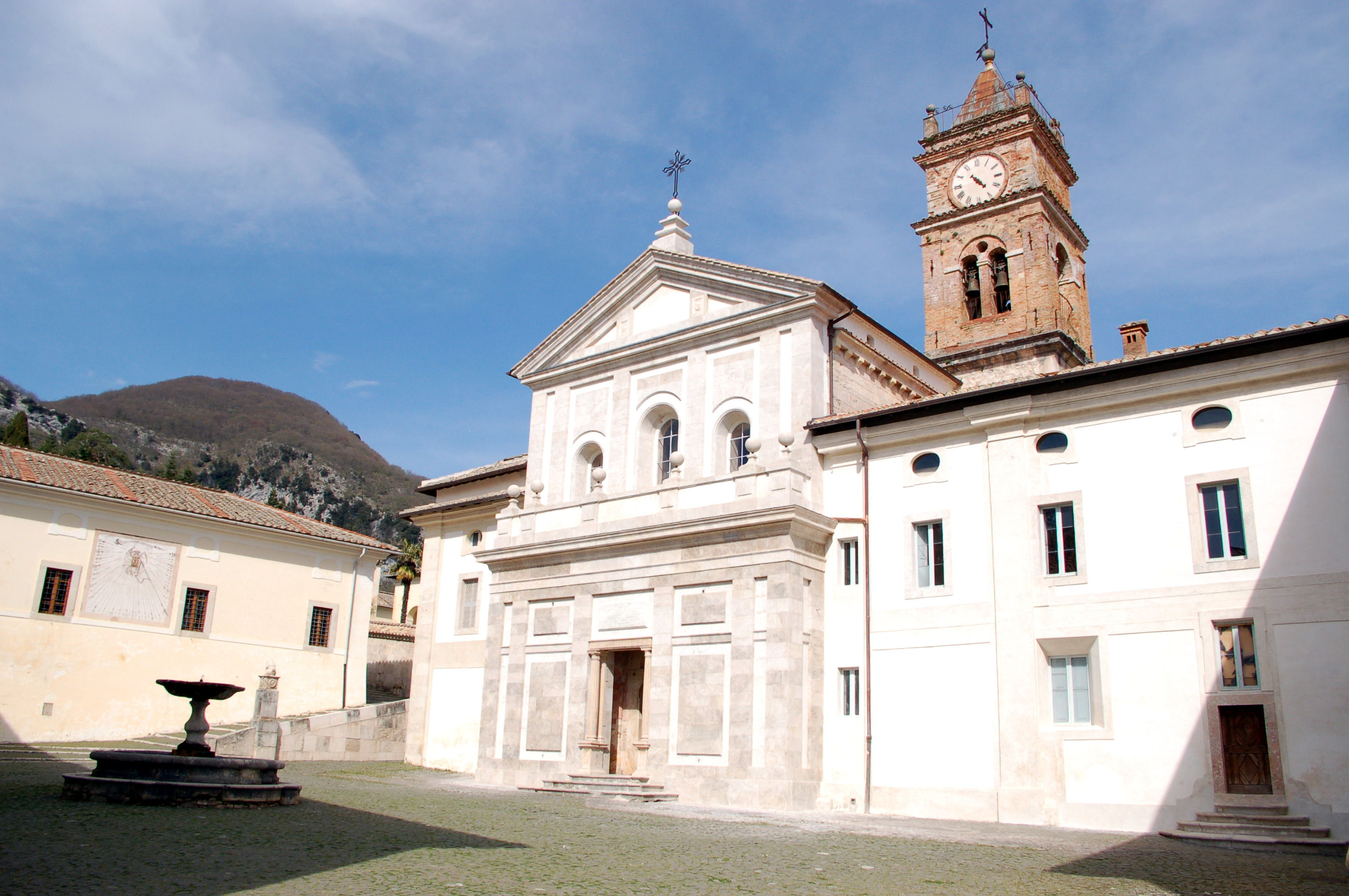 Chiesa di San Bartolomeo - Certosa di Trisulti